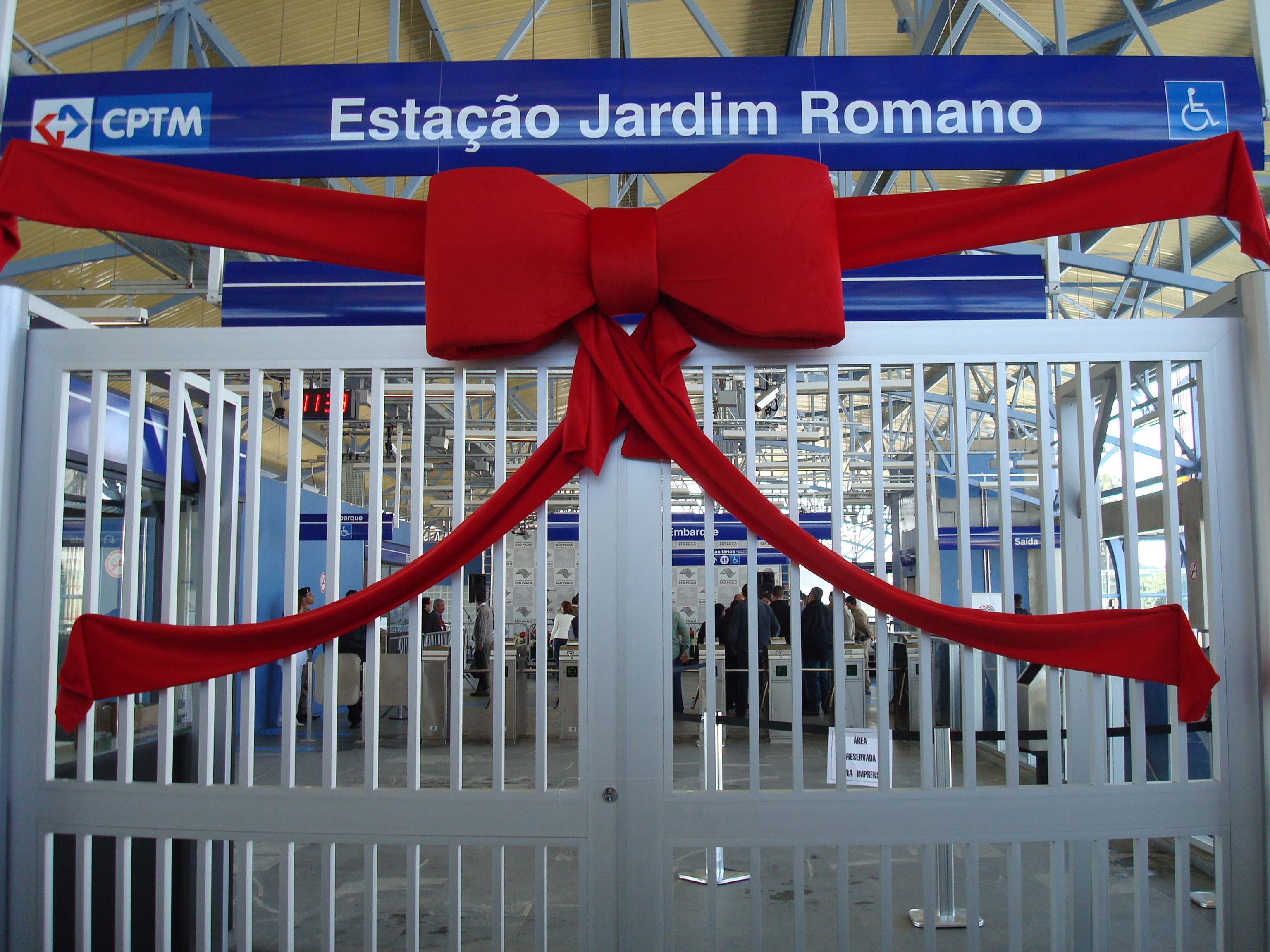 Estação Jardim Romano - CPTM